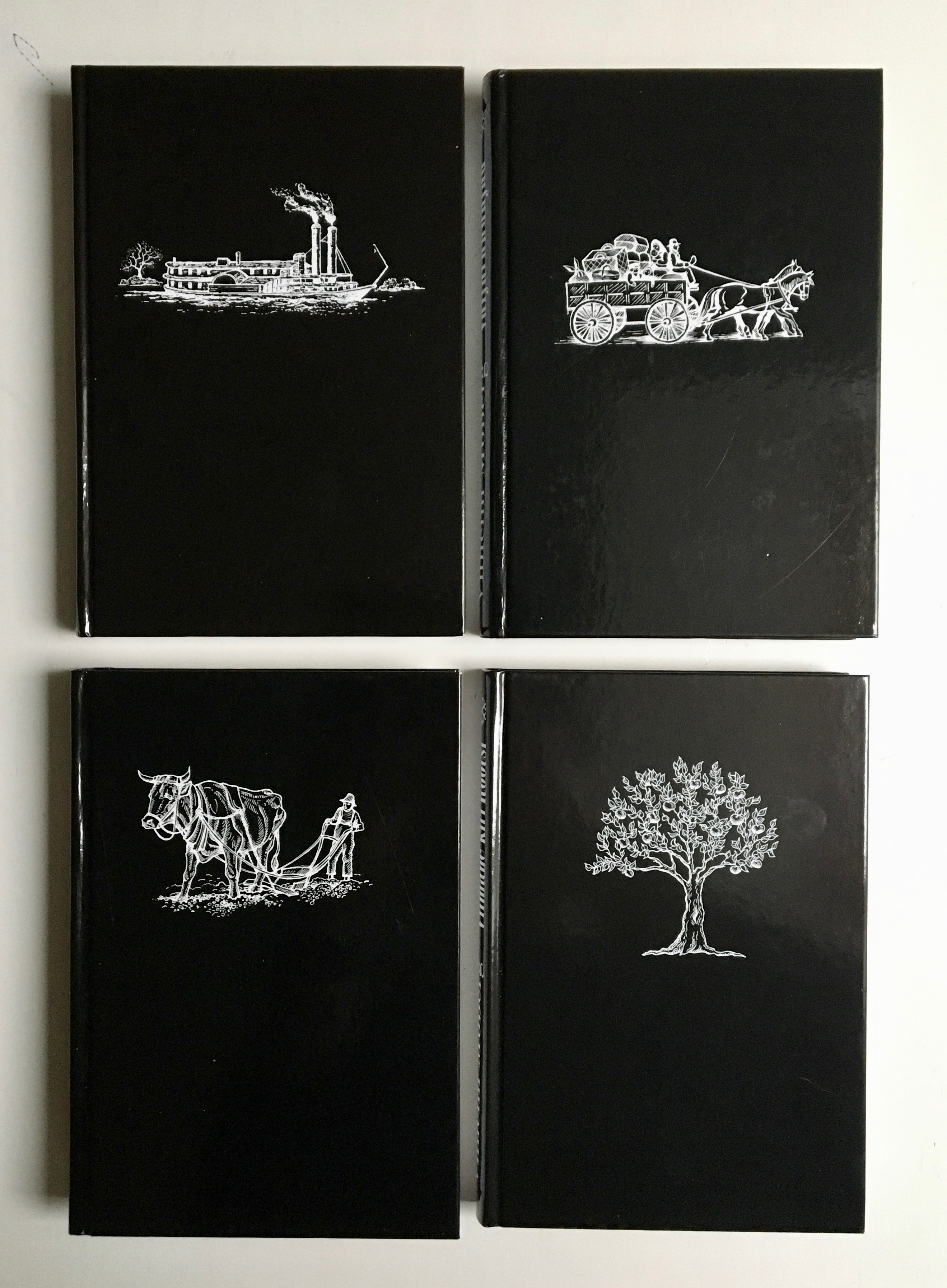 PR Moberg raamatute esikaaned